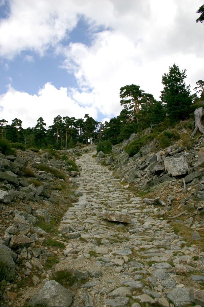 Calzada romana Roman road that leads to Segovia through Fuenfría. It is also the road to Santiago de Compostela. Según las investigaciones de Jesús Rodríguez Morales, el camino marcado como "calzada romana" y sus puentes no son romanos sino de la época de Felipe V y posterior, el camino para la "jornada" real a La Granja. La auténtica vía romana ha sido erosionada pero la cuneta superior que la desaguaba fue rellenada con sedimentos y formó el "camino viejo a Segovia". La Vía Romana del Puerto de la Fuenfría